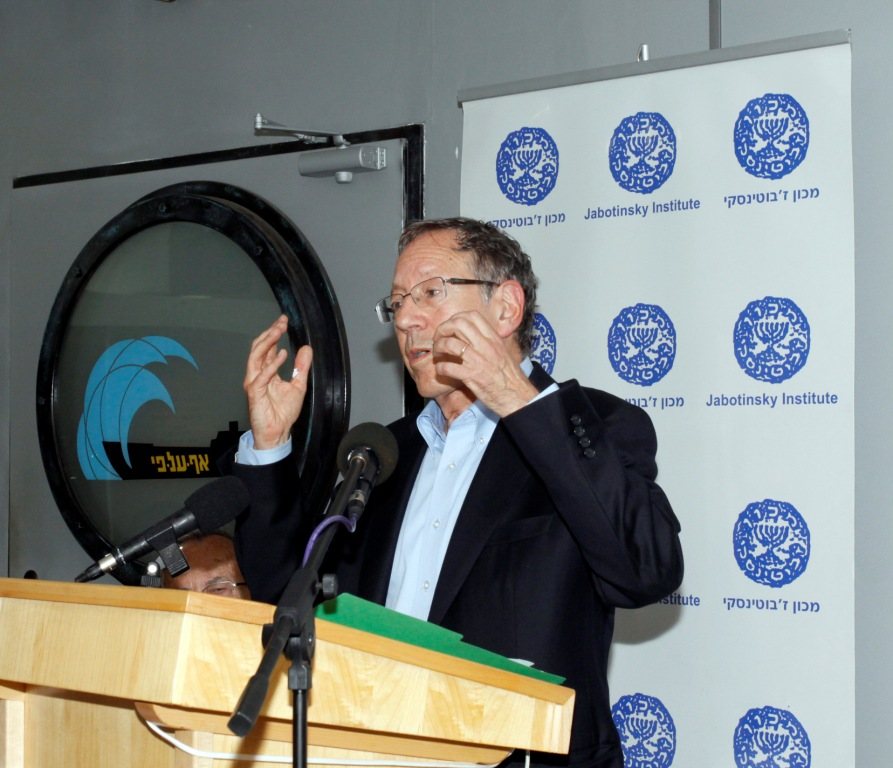 פרופ' ארווין קוטלר נושא את "הרצאת ז'בוטינסקי" במכון ז'בוטינסקי בתל אביב